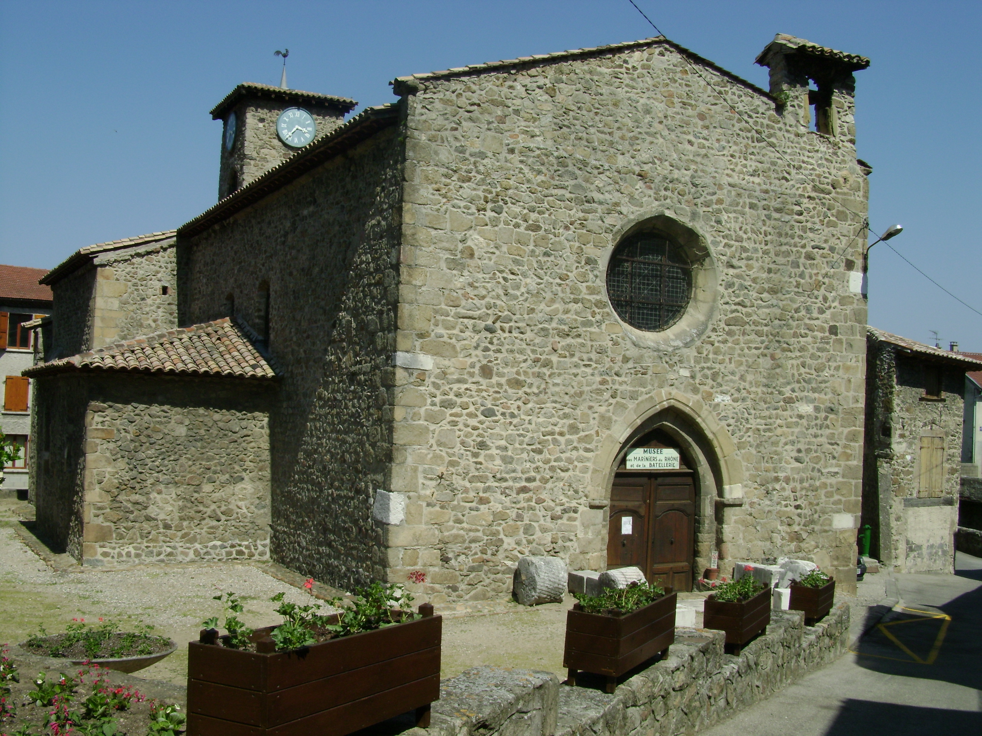 Serrières (Ardèche): Ancienne chapelle Saint-Sornin, actuel musée des mariniers